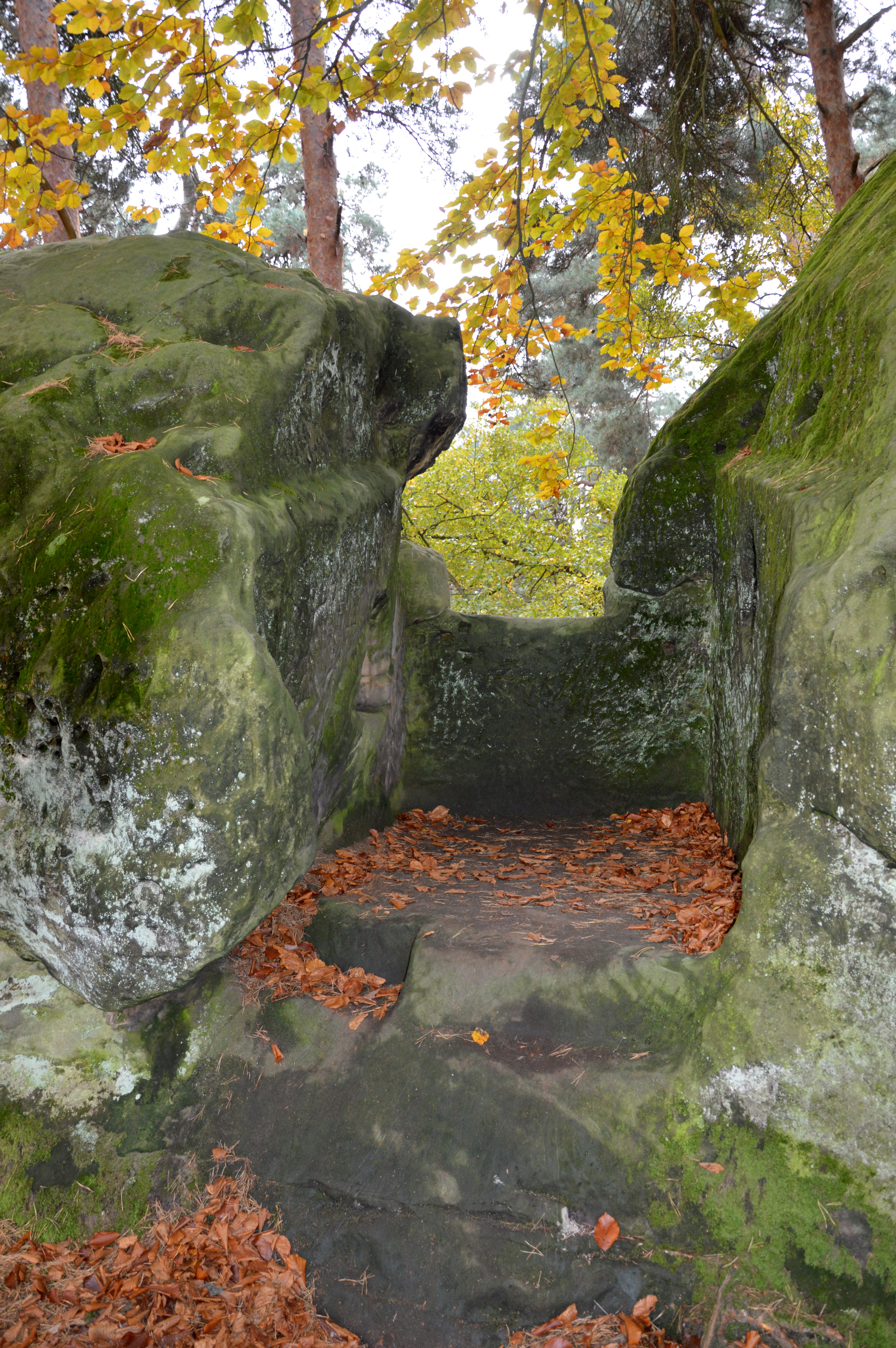 Heidelbergwarthe Teufelsmauer